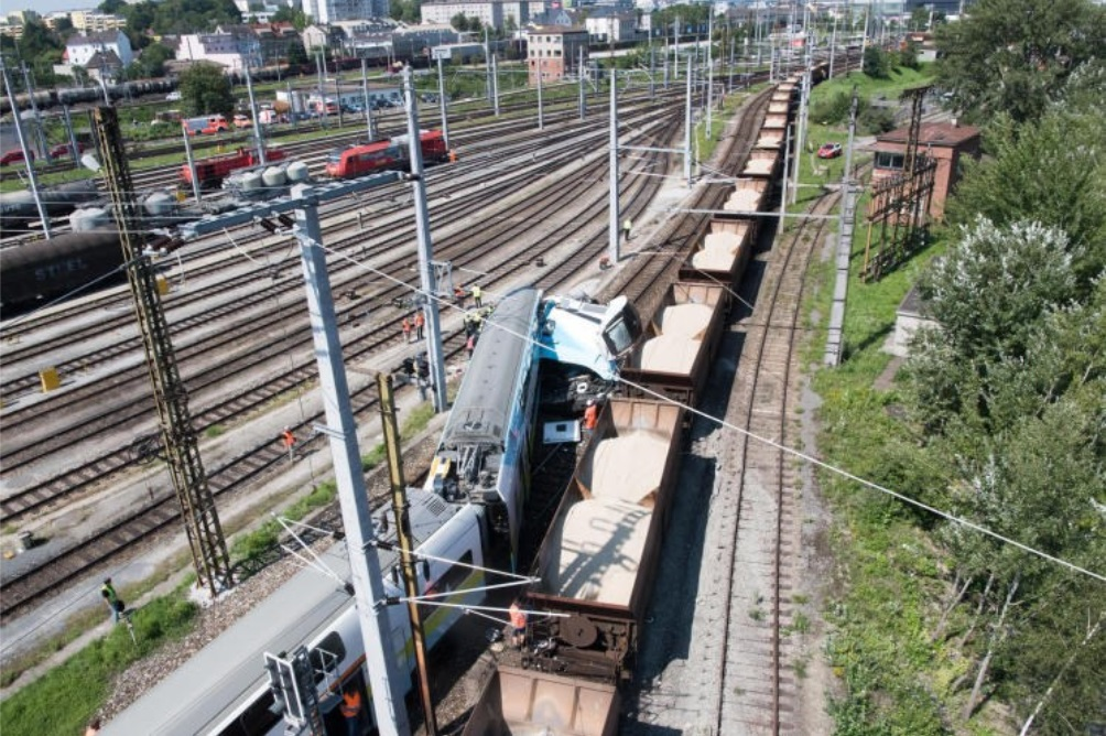 Am 23. August 2017 kollidierte im Verschiebebahnhof Linz Ost ein neuer Kiss-Triebzug der Westbahn mit einem Erzzug von CargoServ.